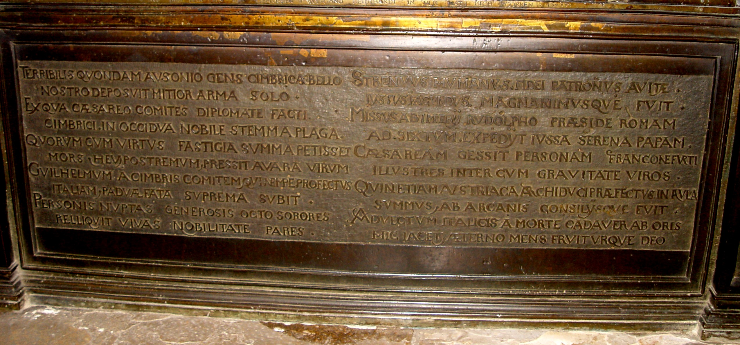 Inschrift auf dem Epitaph des Wilhem von Zimmern